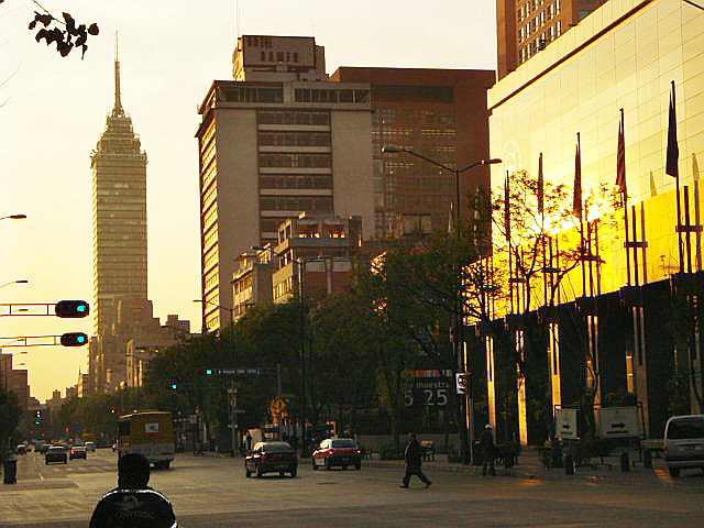 Torre Latinoamericana al amanecer en la Ciudad de México.